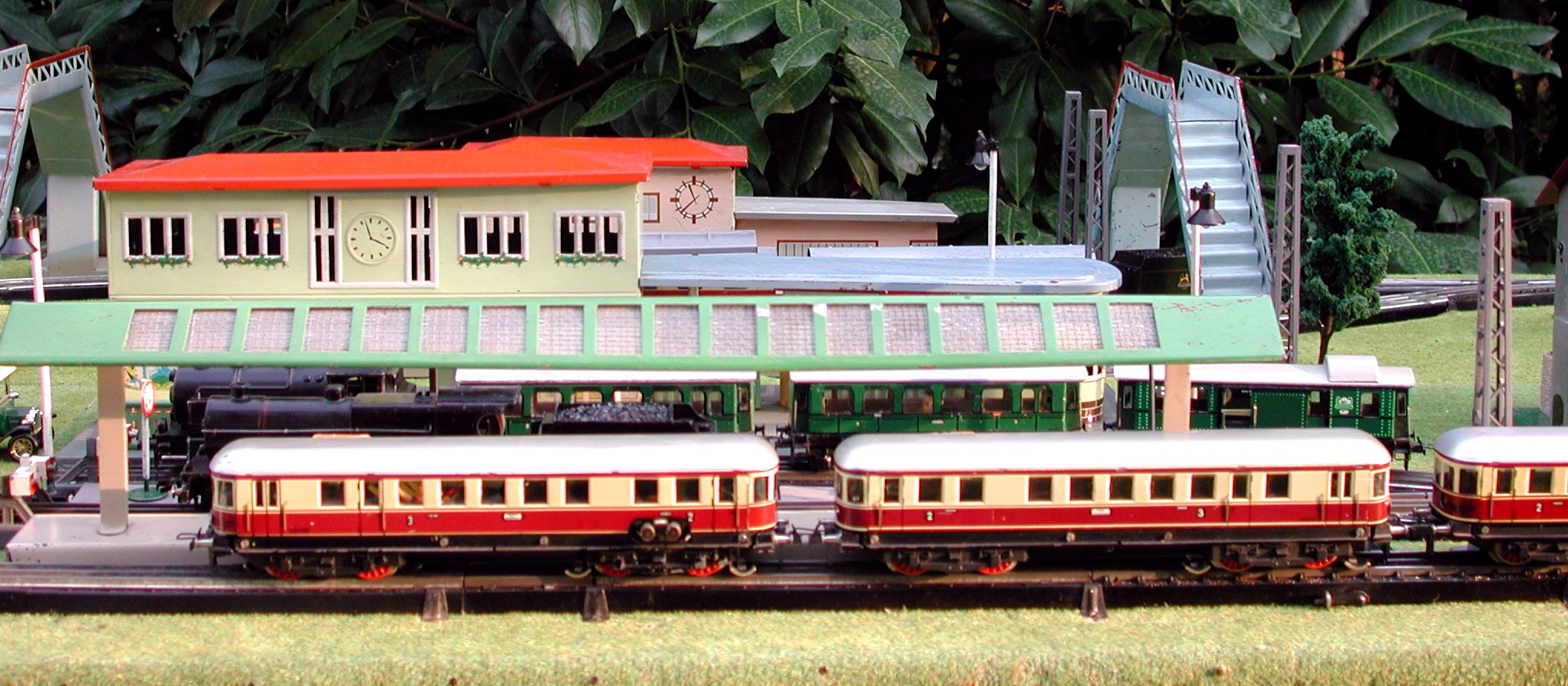 2-teiliger Trix Express Triebwagen 20/58 mit fahrtrichtungsabhängigen Lichtwechsel auf Bakelitgleisen, - Wechselstromausführung, Bj. ca. 1938. Im Hintergrund Zubehörteile von Kibri (Bahnsteig, Übergangsbrücke) und Heinrich Wimmer (Bahnhöfe). Die Maßstäblichkeit von rollendem Material und Zubehör wurde seinerzeit noch nicht so streng eingehalten. Sie schwankte zwischen 1: 90 und 1:100. Die farbenfrohe Szenerie des damaligen Blechspielzeugs war in dieser Zeit typisch. Foto: Michael Linnenbach 10:30, 23. Feb 2006 (CET) GNU-FDL